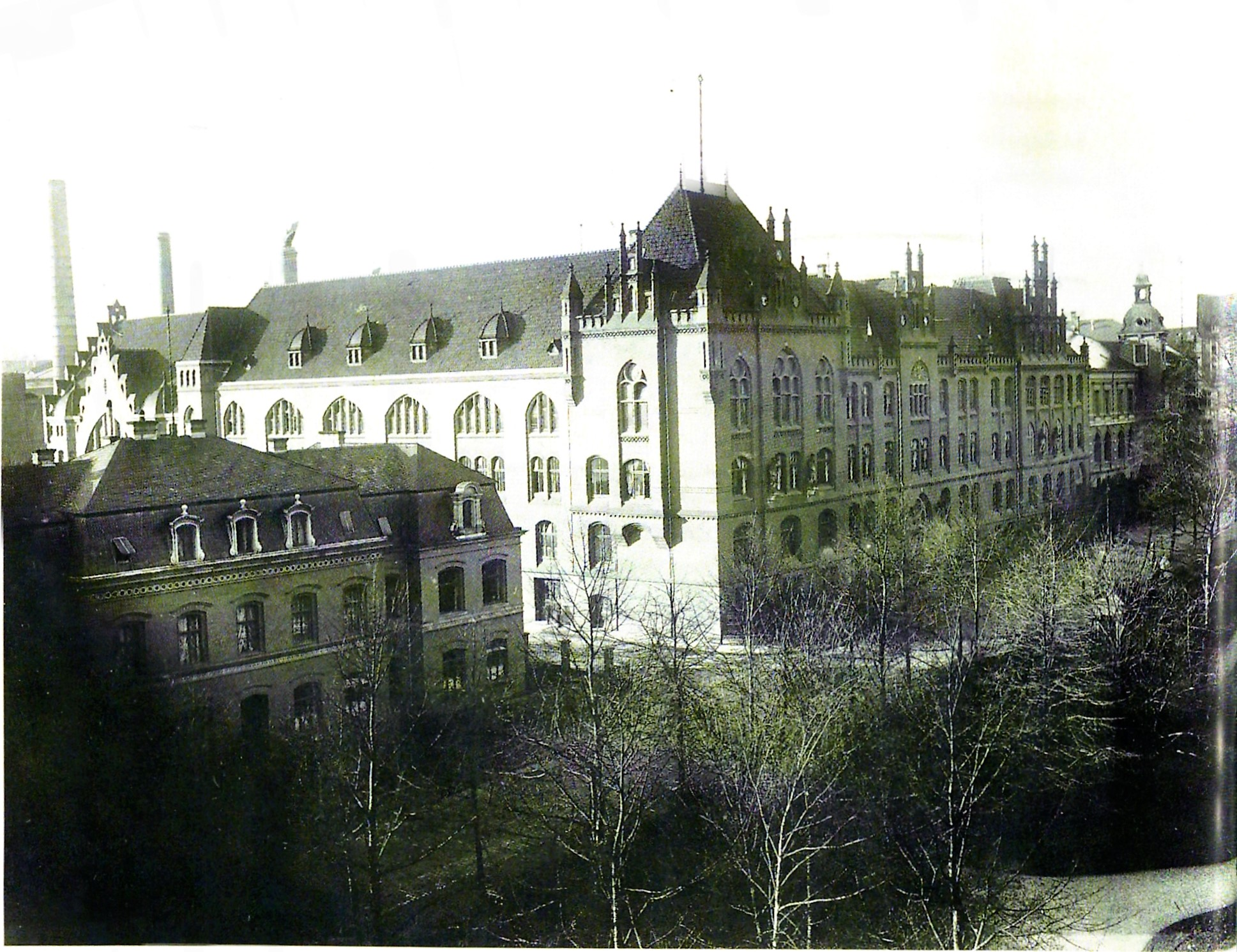 das RWKS ca 1910 mit neuem Flügel von 1905